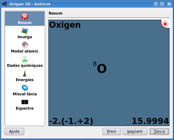 Captura de pantalla del Kalzium